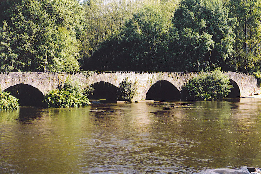 self made